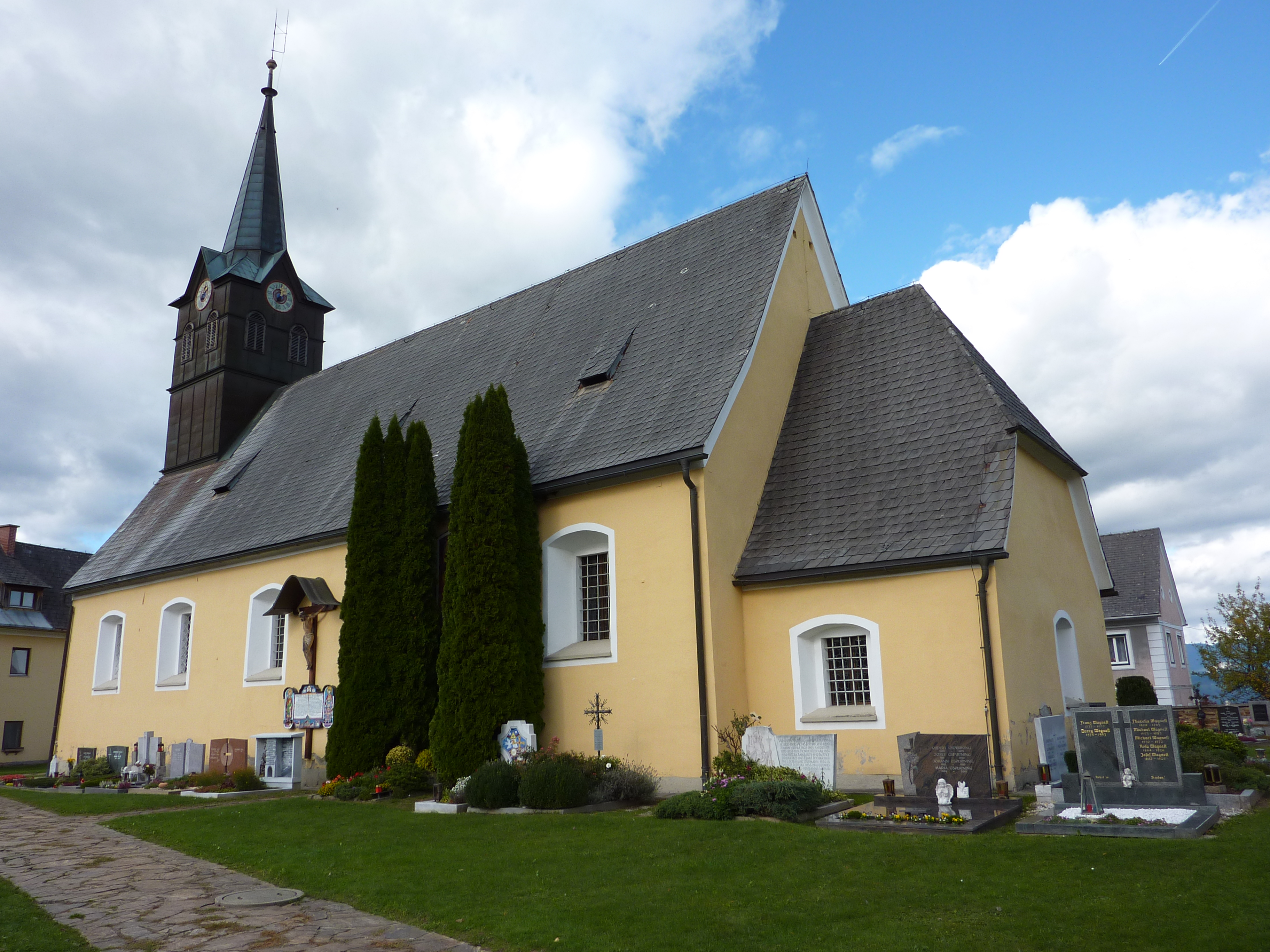 Pfarrkirche hl. Martin, Sankt Martin am Wöllmißberg, Steiermark